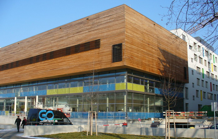 Stuttgart-Bad Cannstatt Haus des Sports - SpOrt selbst fotografiert von User:Enslin am 15 JAN 2006 in Stuttgart